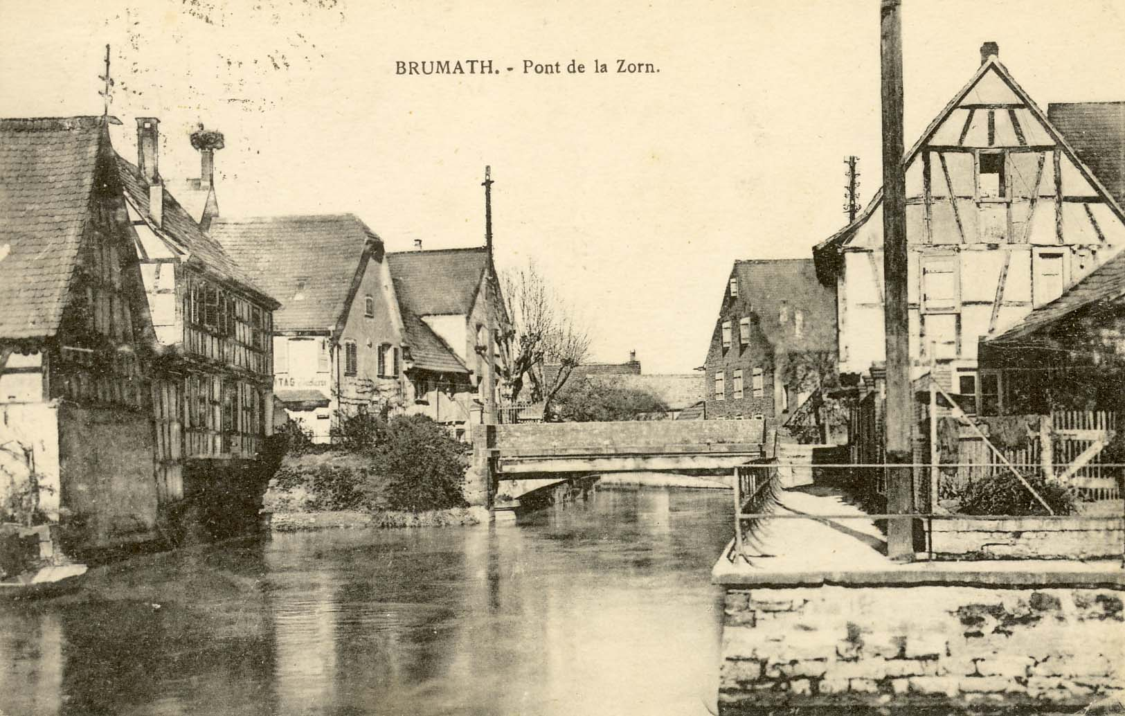 Carte postale du pont sur la Zorn à Brumath en 1932